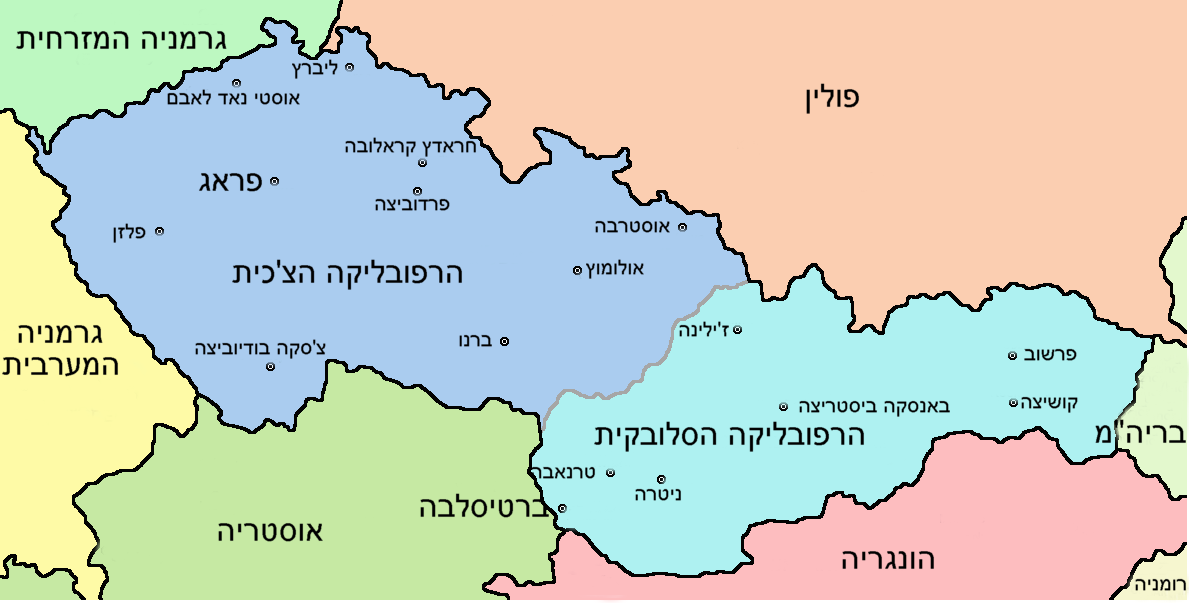 מפת צ'כוסלובקיה